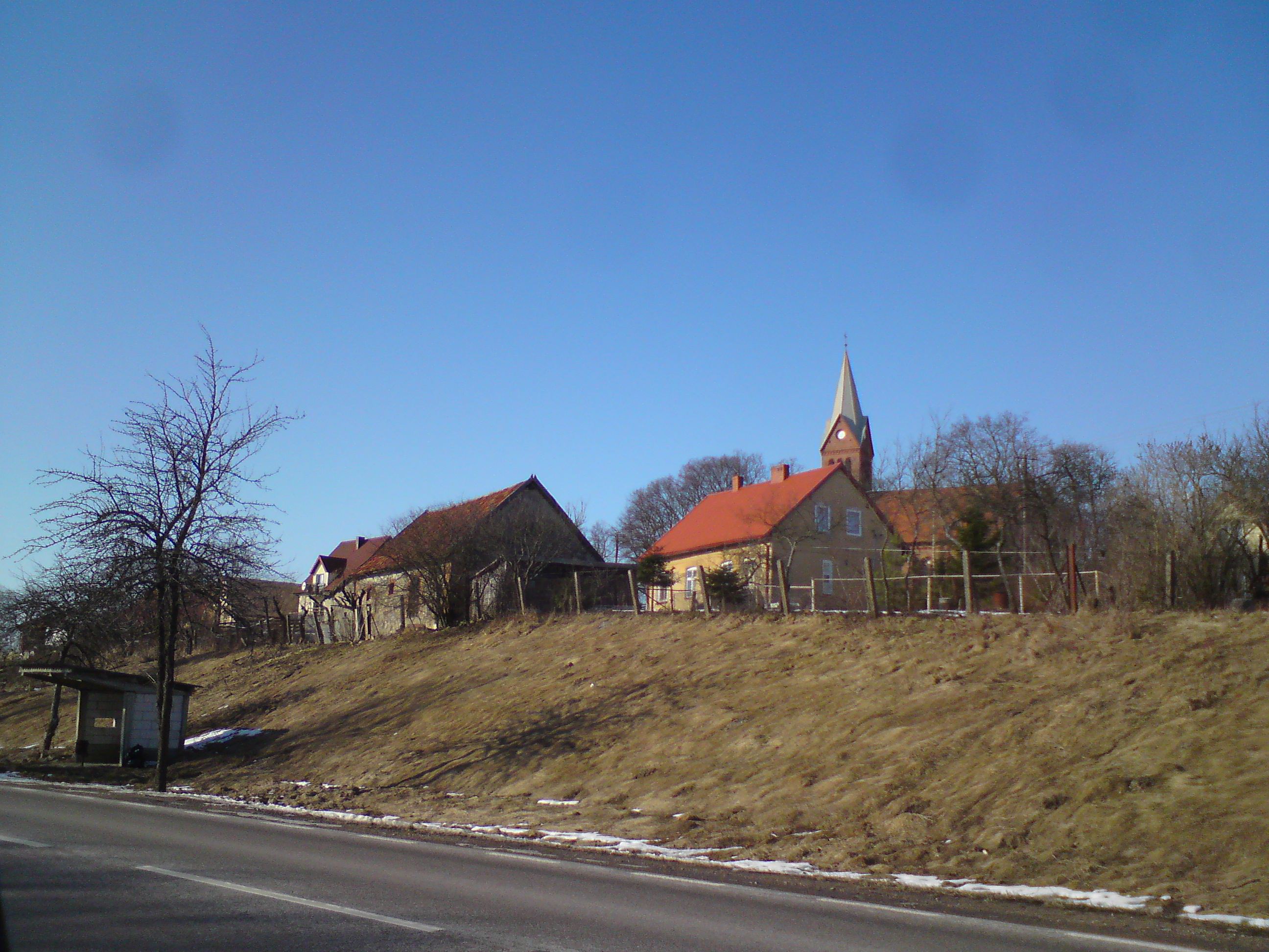 Klusy